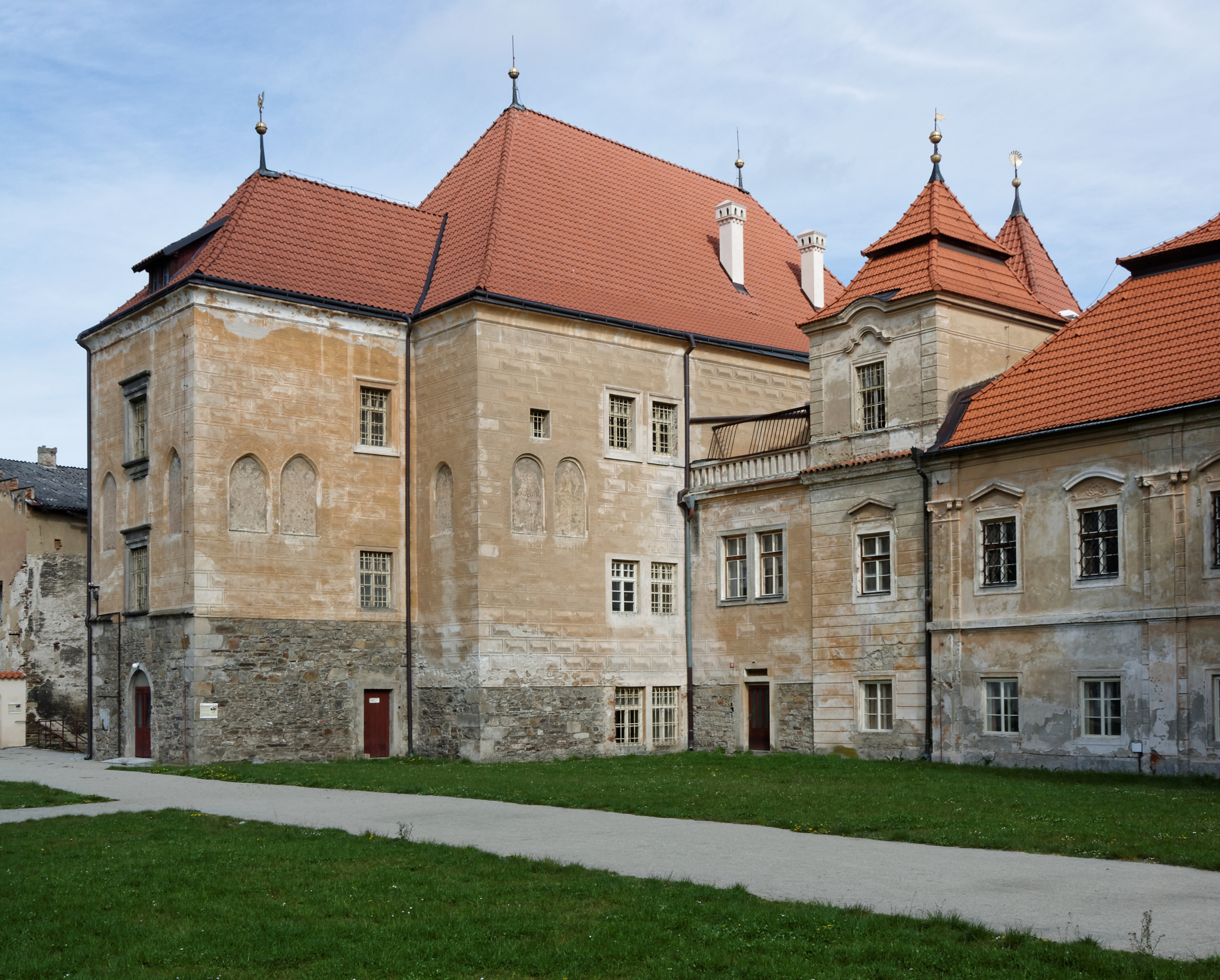 Klášter Želiv, Trčkův hrad, pohled od jihivýchodu.